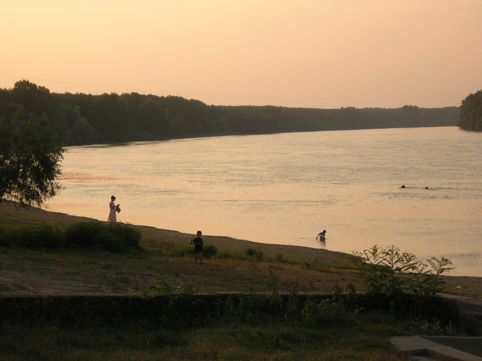 Danube between Belene and Belene island at sunset